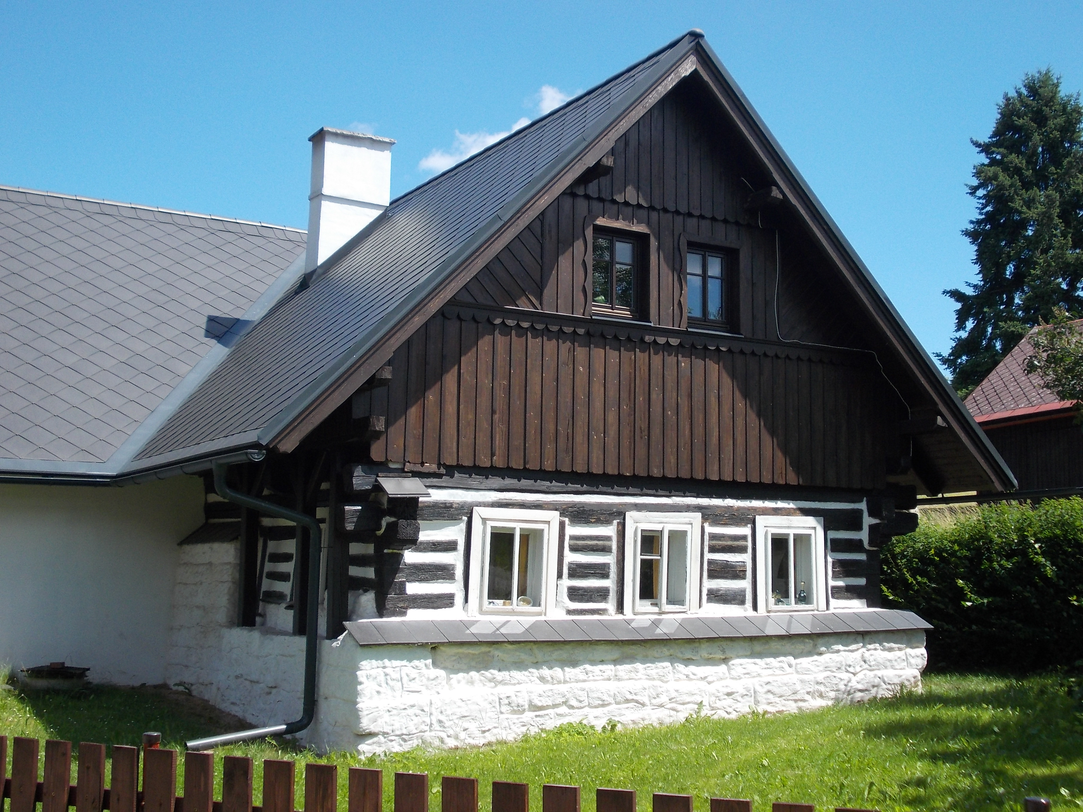 Levínská Olešnice - dům č.p. 28